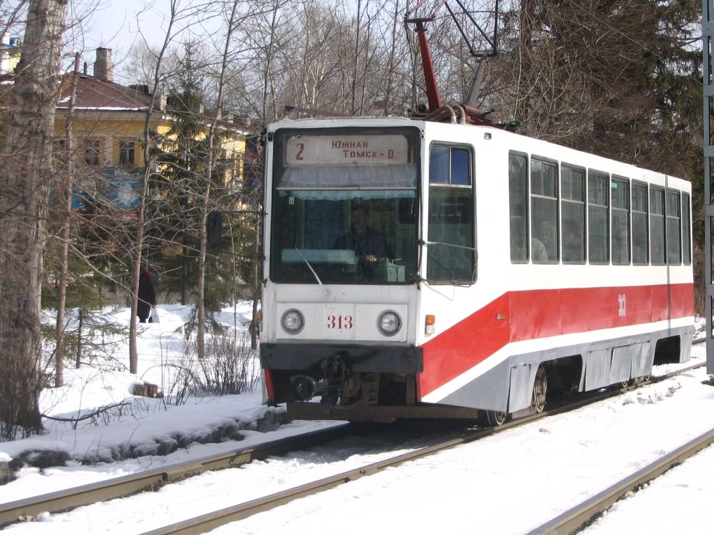 Modern Tram in Tomsk